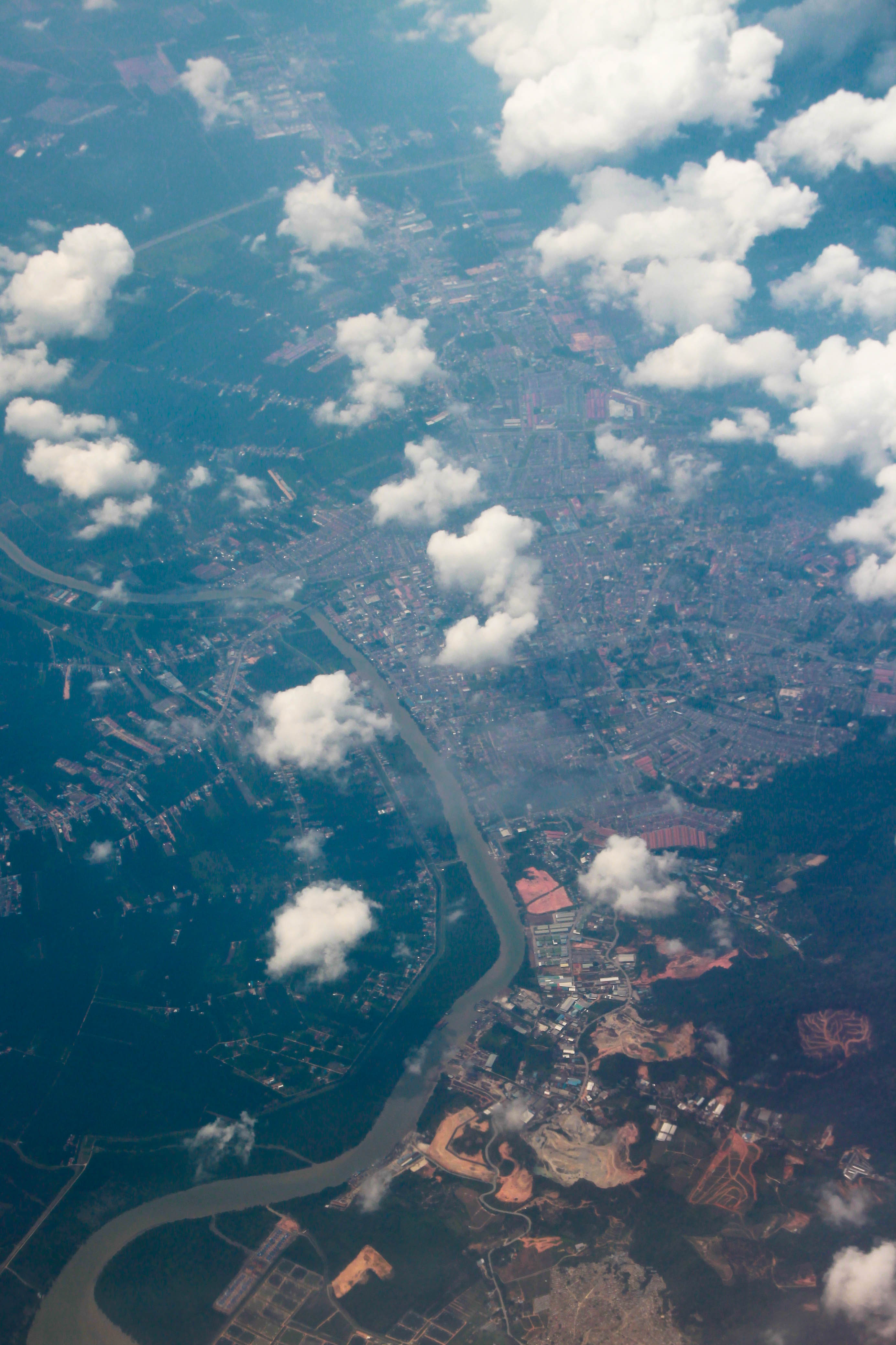 Batu Pahat (Stadt)